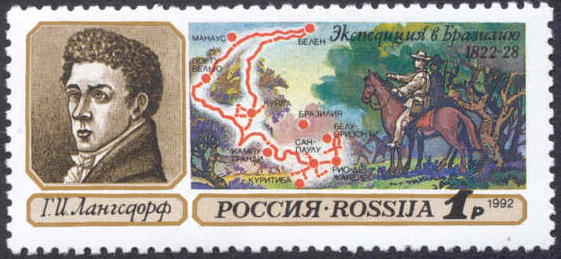 Почтовая марка России из серии «Географические открытия», выпущенная 23 июня 1992 года. На ней изображён портрет Г. И. Лангсдорфа и показан маршрут экспедиции по Бразильскому плоскогорью. Художник — Ю. Левиновский. Номер по каталогу ЦФА — 31. Тираж — 2,6 млн.